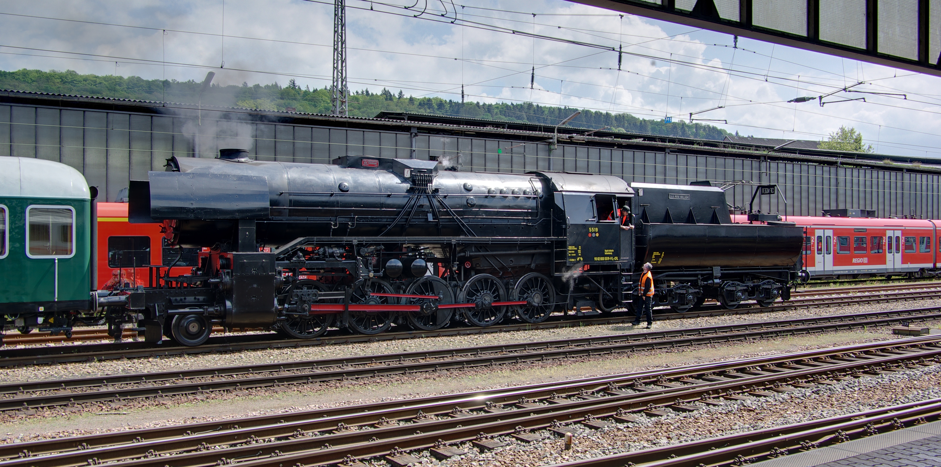 Dampflok 5519 der CFL im Hauptbahnhof Trier.